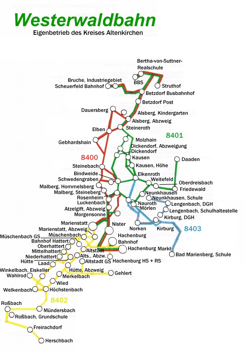 Liniennetzplan der Buslinien des Betriebes Westerwaldbahn im Jahr 2007 vor der Umnumerierung im Jahr 2008